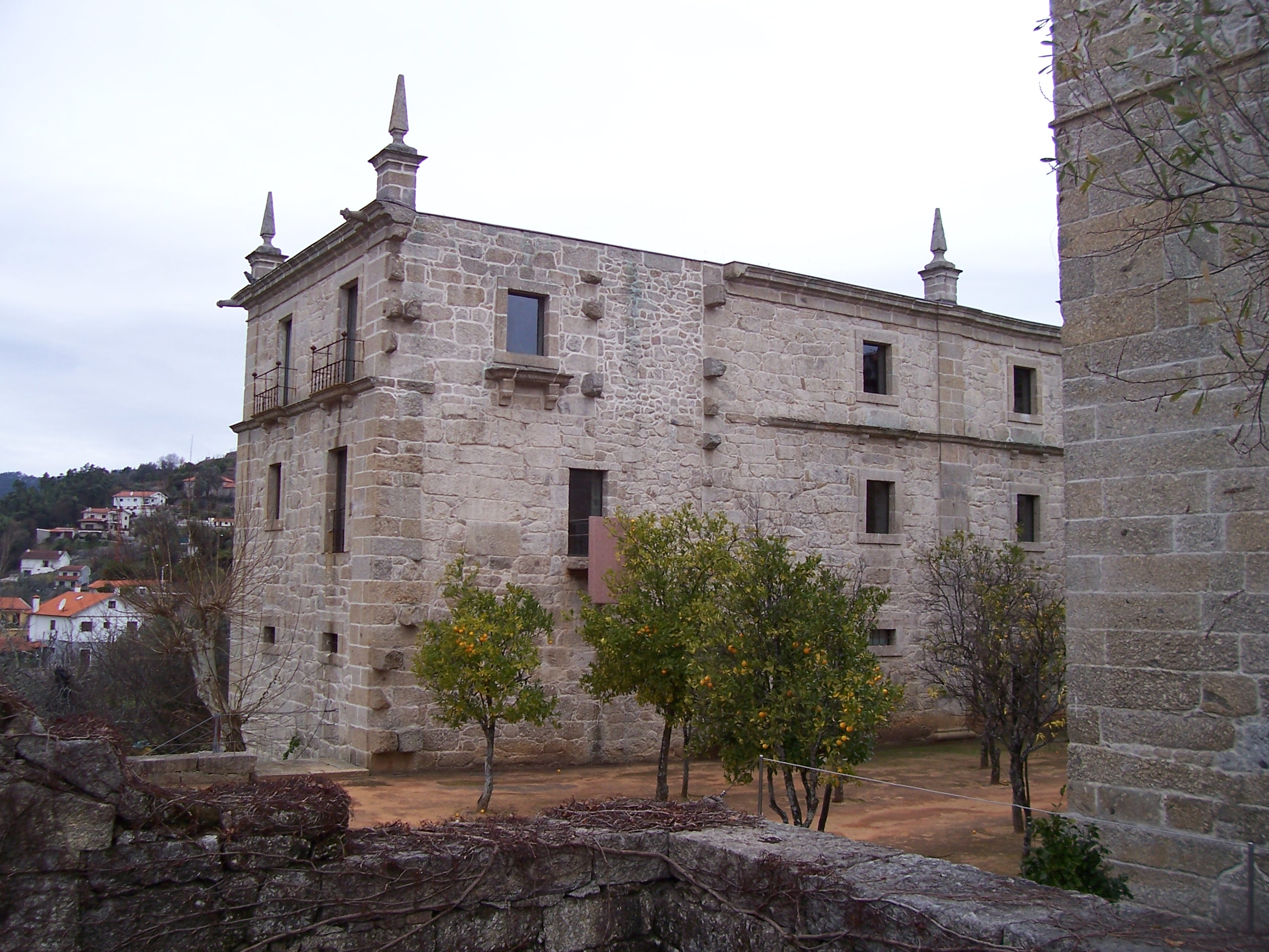 Vistas da Pousada e do seu laranjal This file was uploaded for Wiki Loves Monuments in Portugal with the unique identifier 74590.